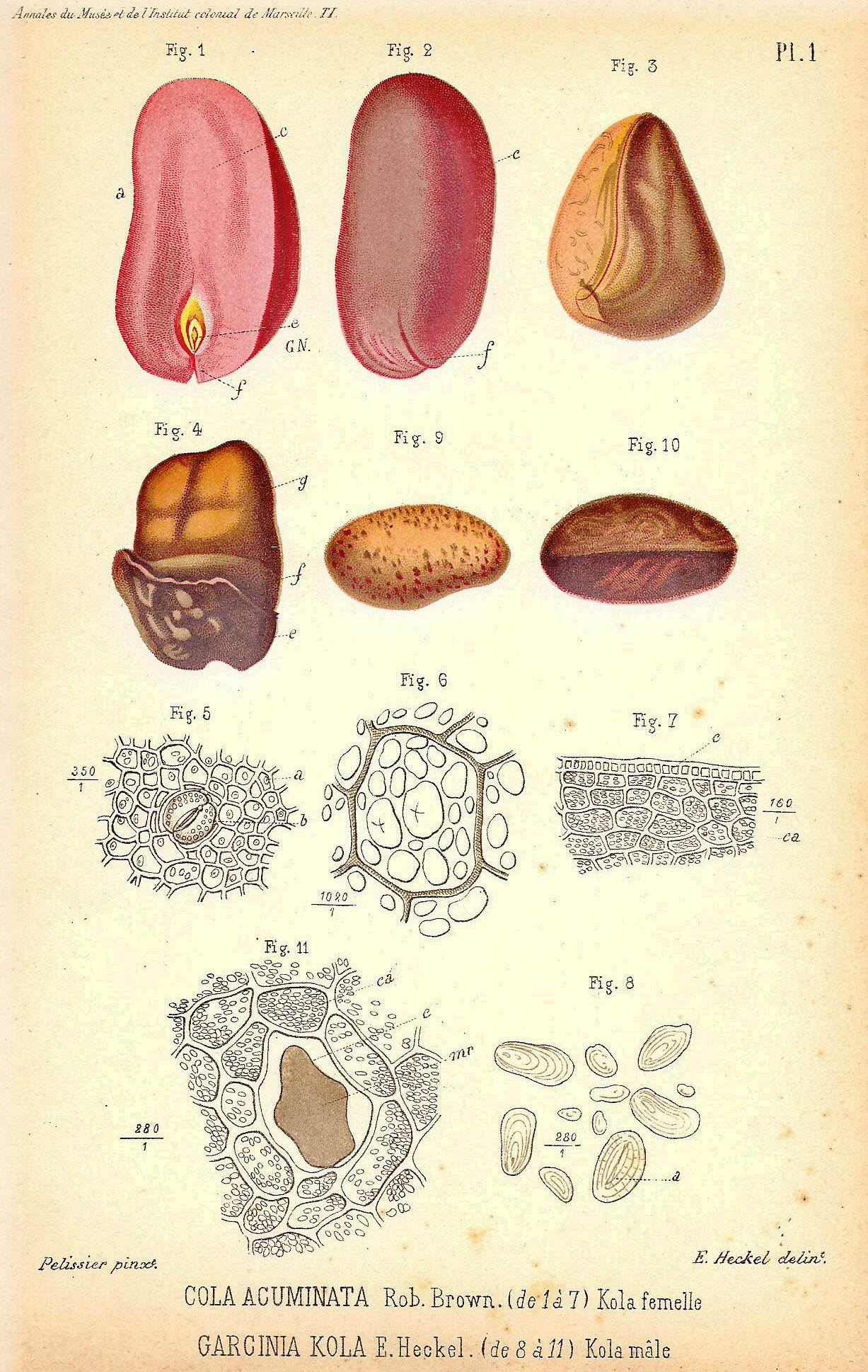 Planche des annales de l'Institut de botanique coloniale, 1898, étude du docteur Heckel.